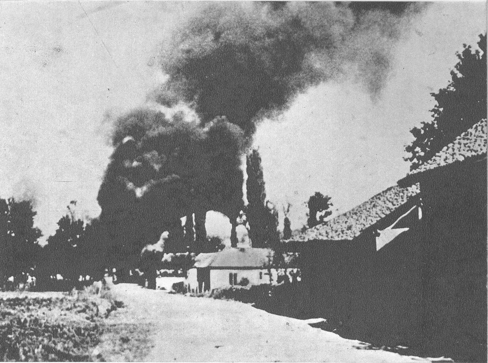 Srpskohrvatski / српскохрватски: Italijani pale sela u Hrvatskoj u jesen 1942.